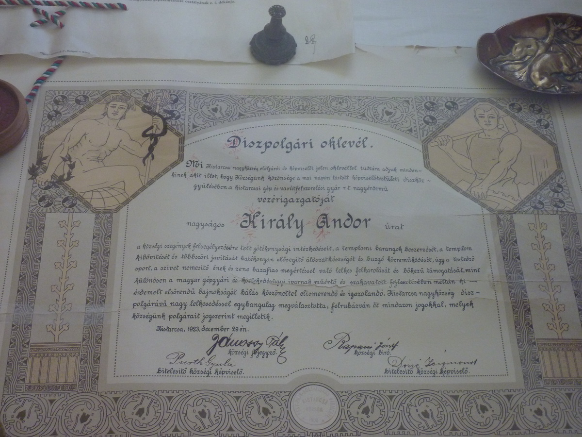 Király Andor - díszoklevél